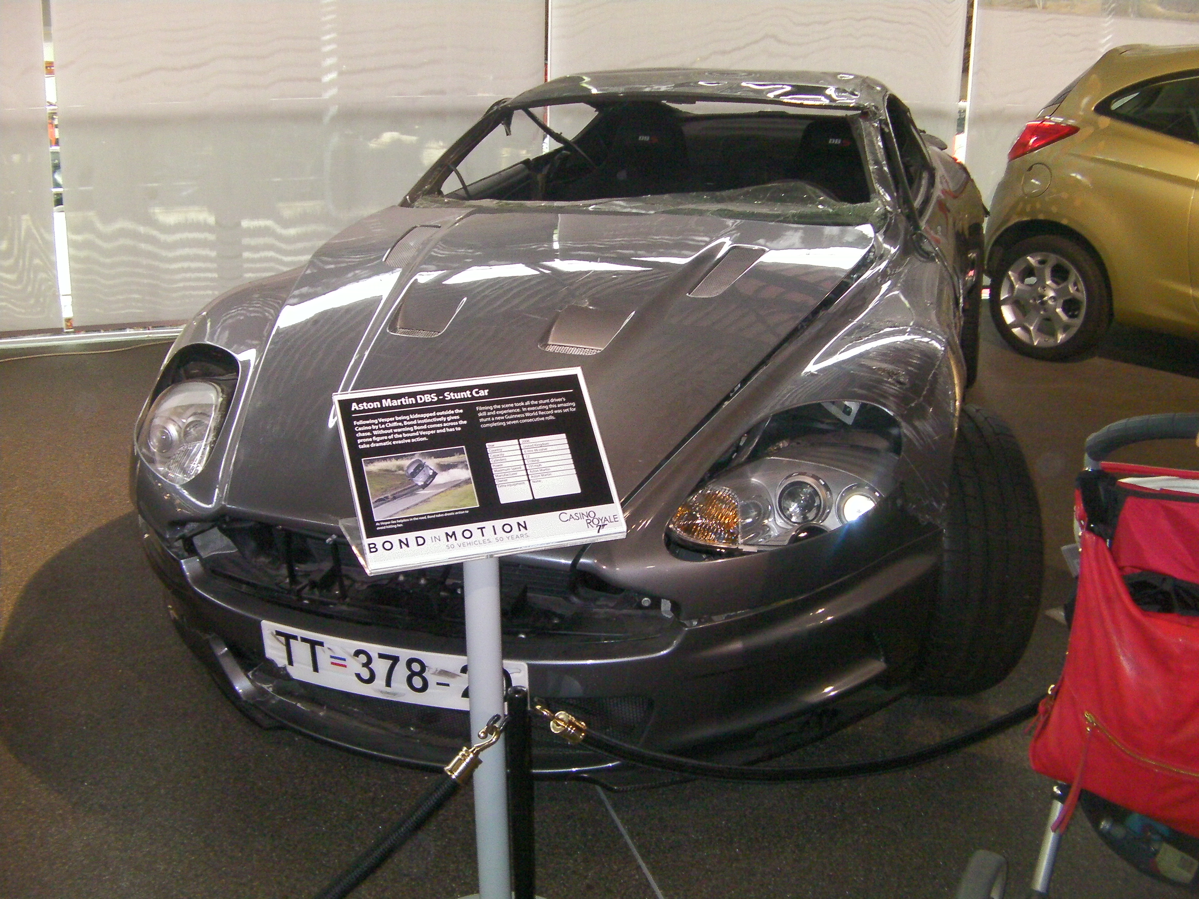 Karr-tan James Bond Aston Martin DBS Casino Royale National Motor Museum at Beaulieu (Mirdi broadel ar motorioù e Beaulieu)